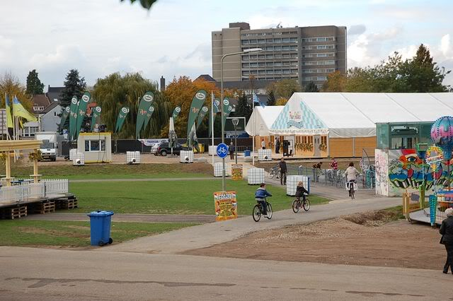 Een deel van het terrein bij het Oktoberfeest in Sittard